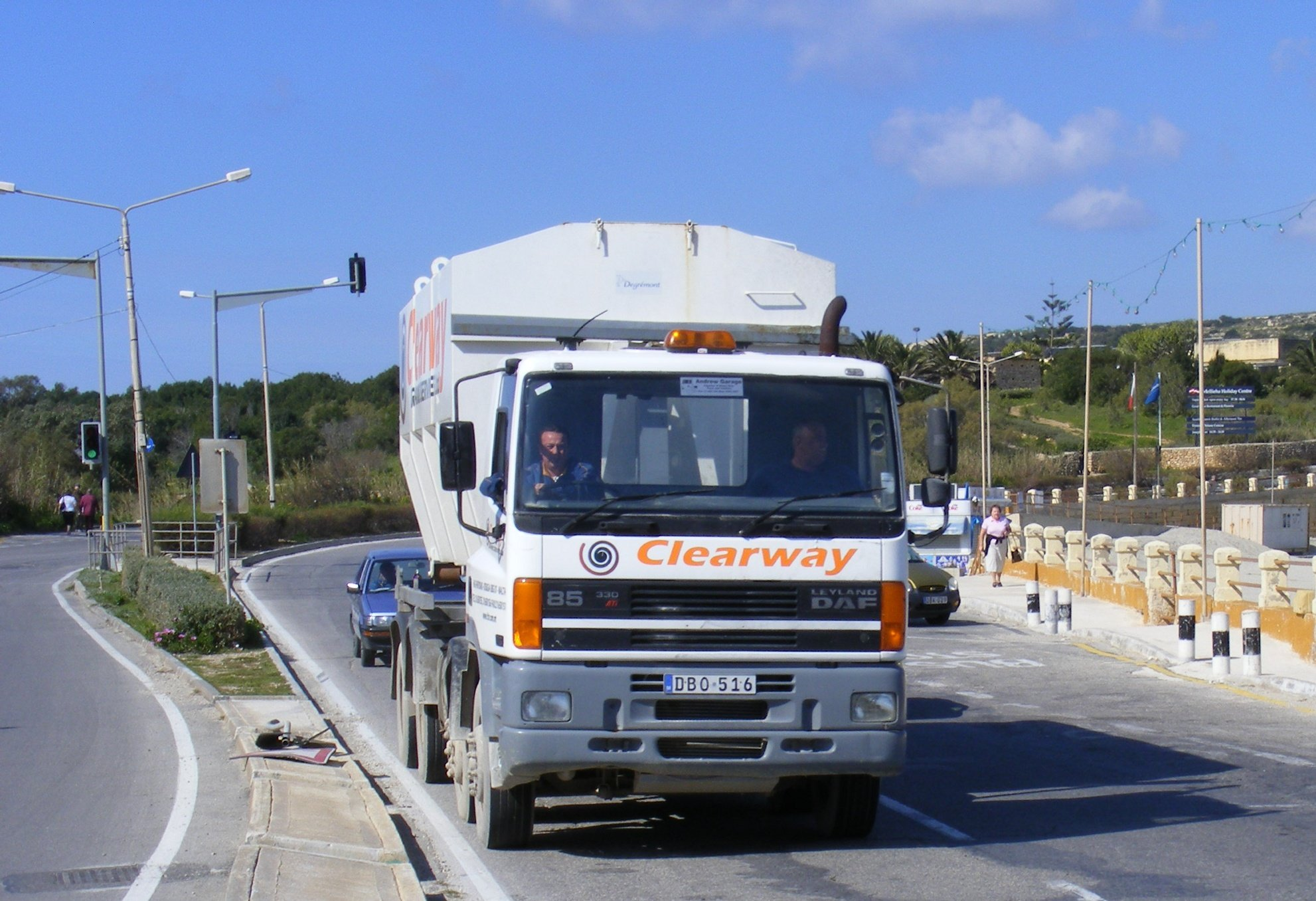 DAF 85-330 Malta 2009